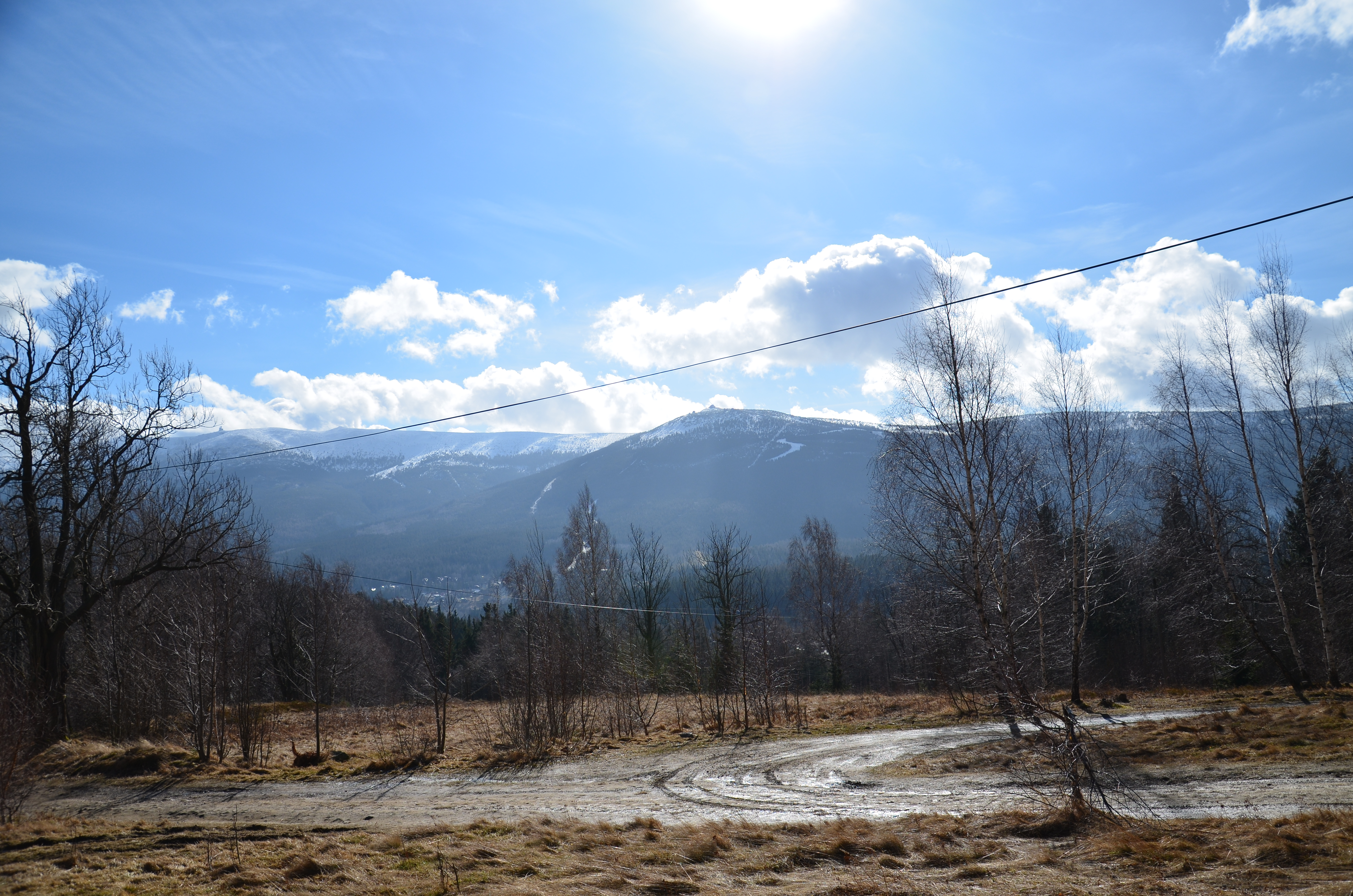 Obszar specjalnej ochrony ptaków Góry Izerskie. This is a photography of Natura 2000 protected area with ID PLB020009